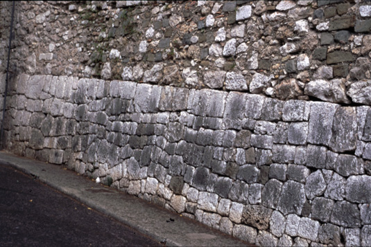 Soubassement d'un mur de soutènement dans la montée du château à Nice (Alpes-Maritimes). Gros blocs taillés aux faces soigneusement dressées pour s'ajuster aux pierres qui les jouxtent. Maçonnerie à joints vifs. Photo de Christian Lassure.